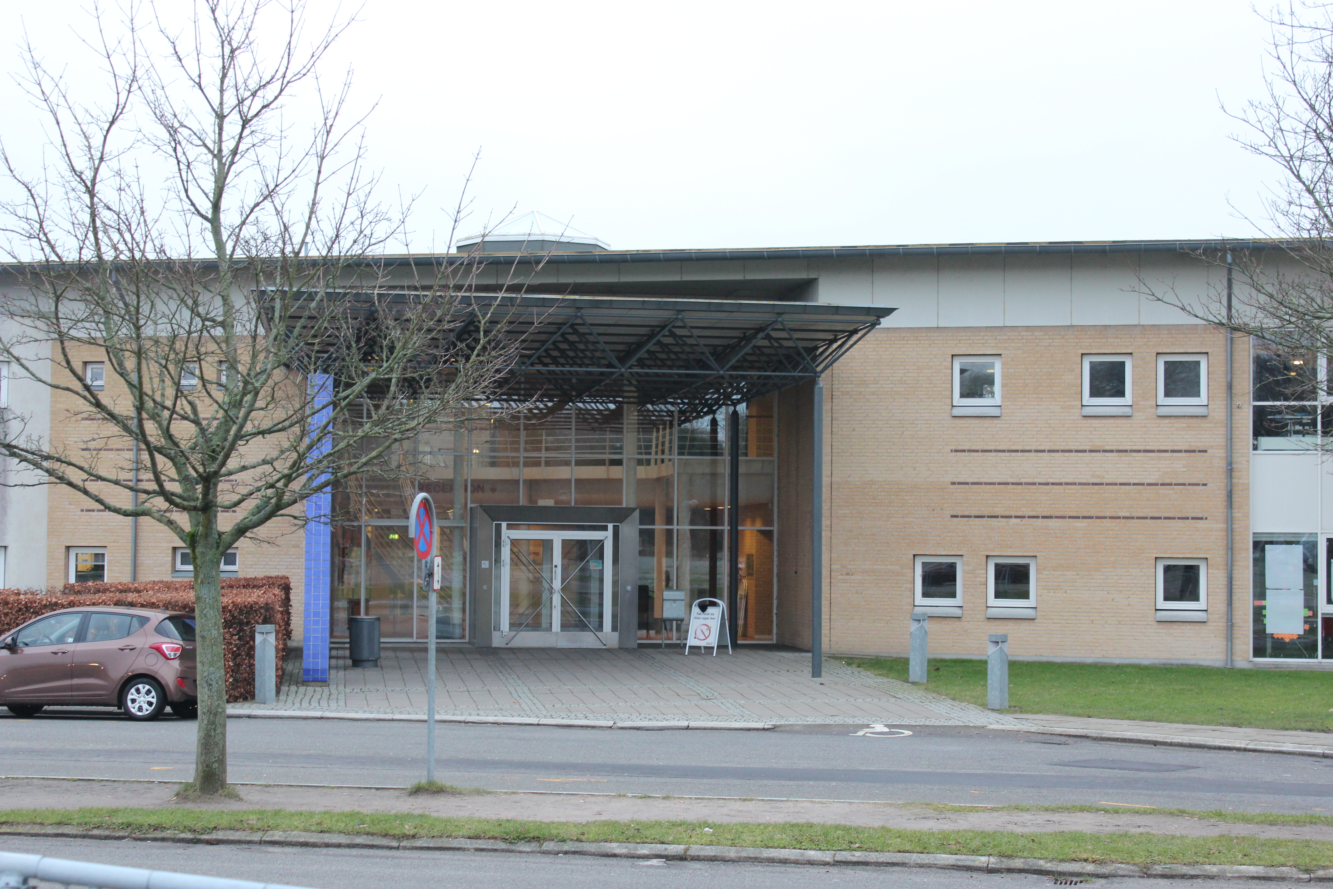 Hovedingangen til CELF på Kringelborg Allé